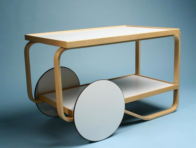 Alva Aaltos Teewagen